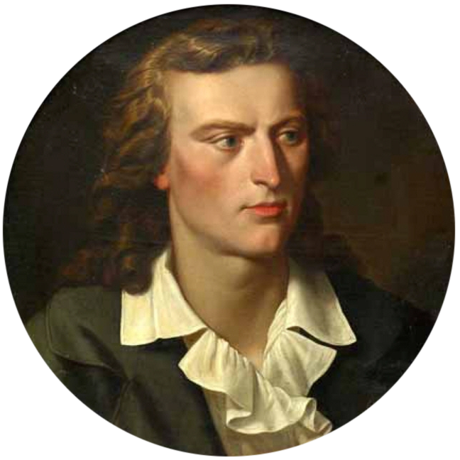 Bildnis Friedrich Schiller, 1861, Öl auf Leinwand, rund: 75 cm Theaterwissenschaftliche Sammlung der Universität zu Köln, Schloss Wahn, Inv.Nr. 5901